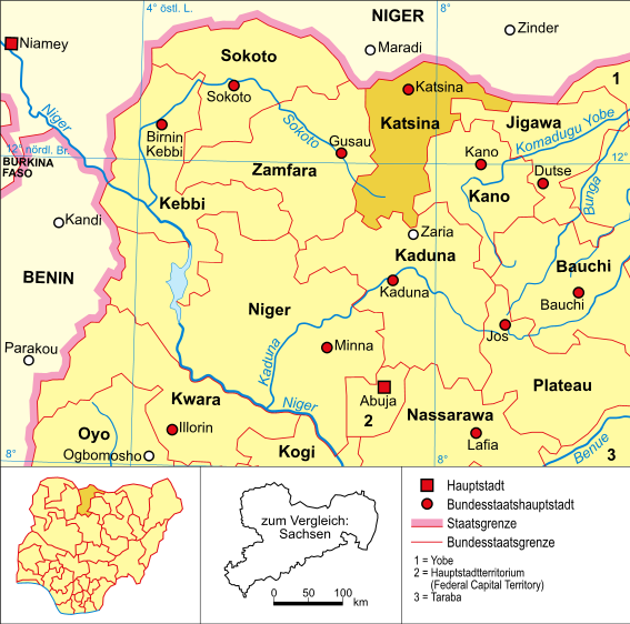 Politische Karte Nigerias (Bundesstaat Katsina hervorgehoben)